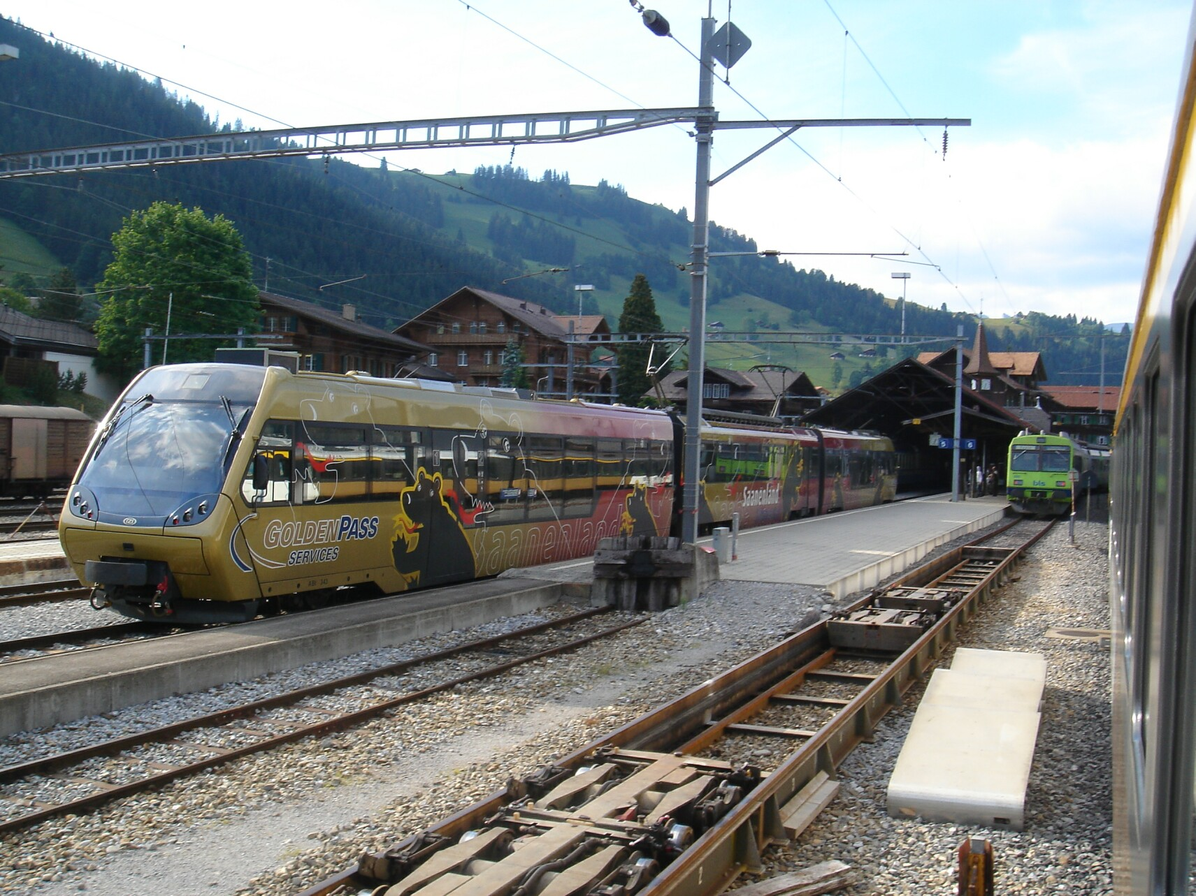 ABt 343 - Be 4/4 5003 - Bt 243 im Bahnhof Zweisimmen neben der Rollbockgrube